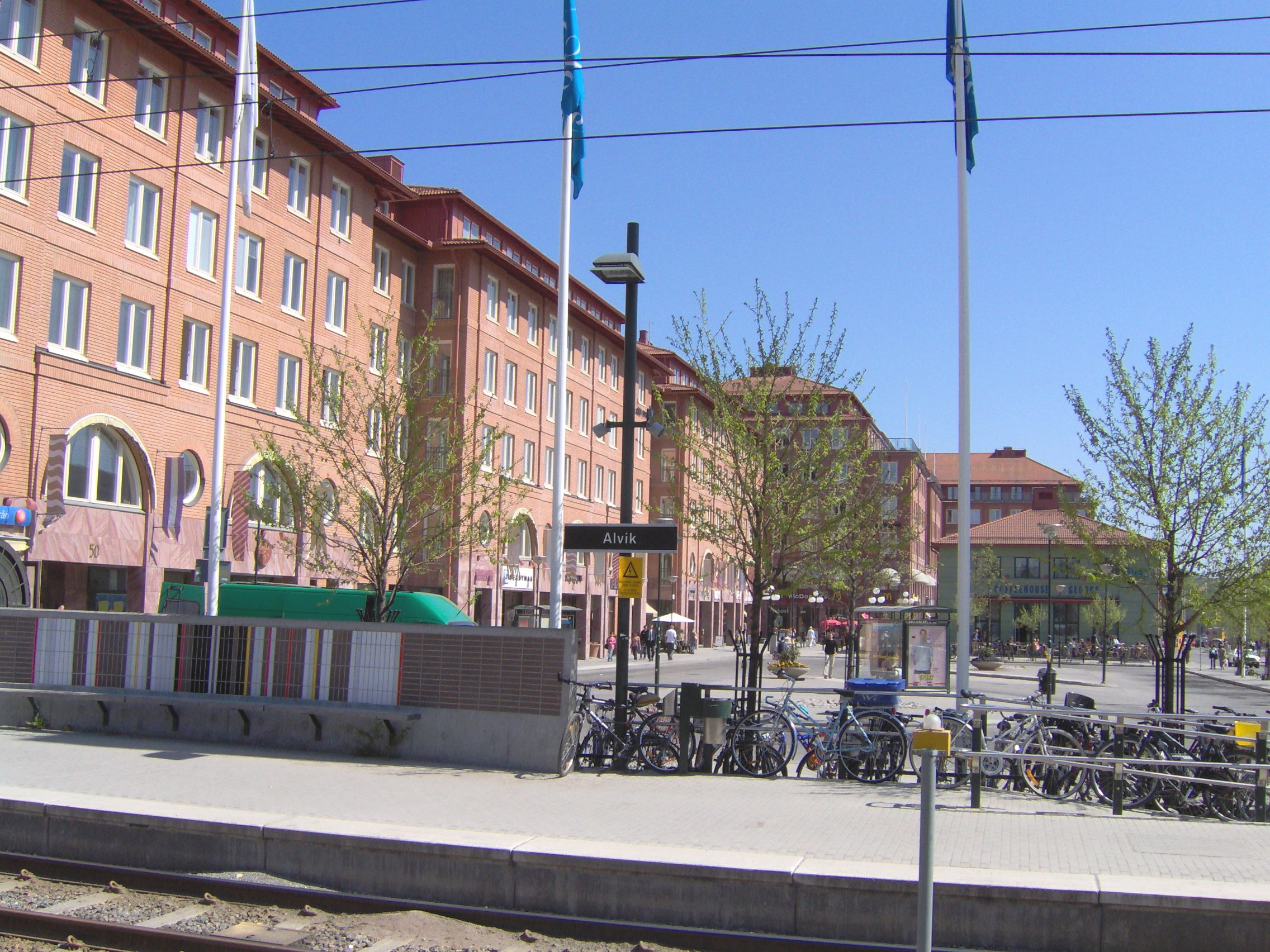 Alvik, Stockholm, Sweden